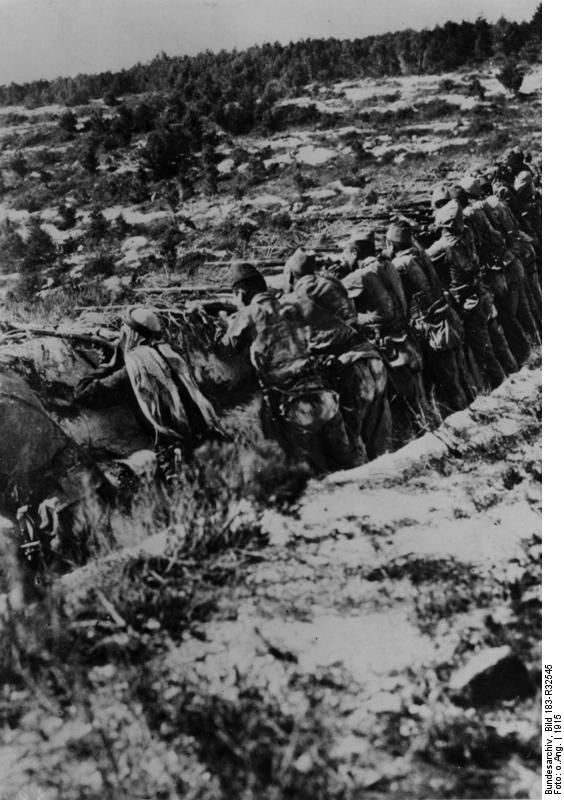 Gallipoli, Schützengraben Türkischer Schützengraben auf Gallipoli. [Türkei, 1. Weltkrieg, Schlacht von Gallipoli]